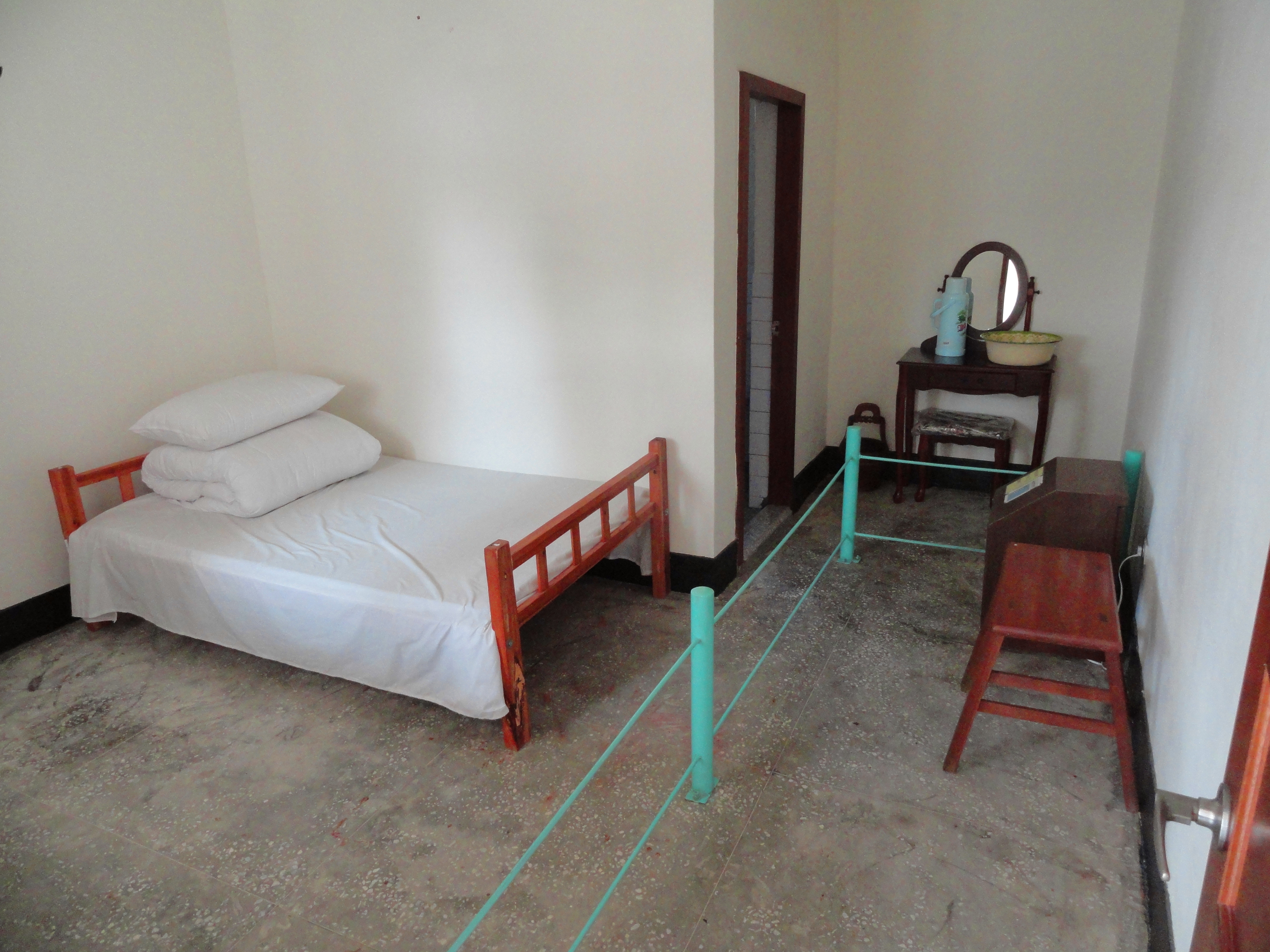 中文（台灣）: 特約茶室房間中文（中国大陆）: 特约茶室房间